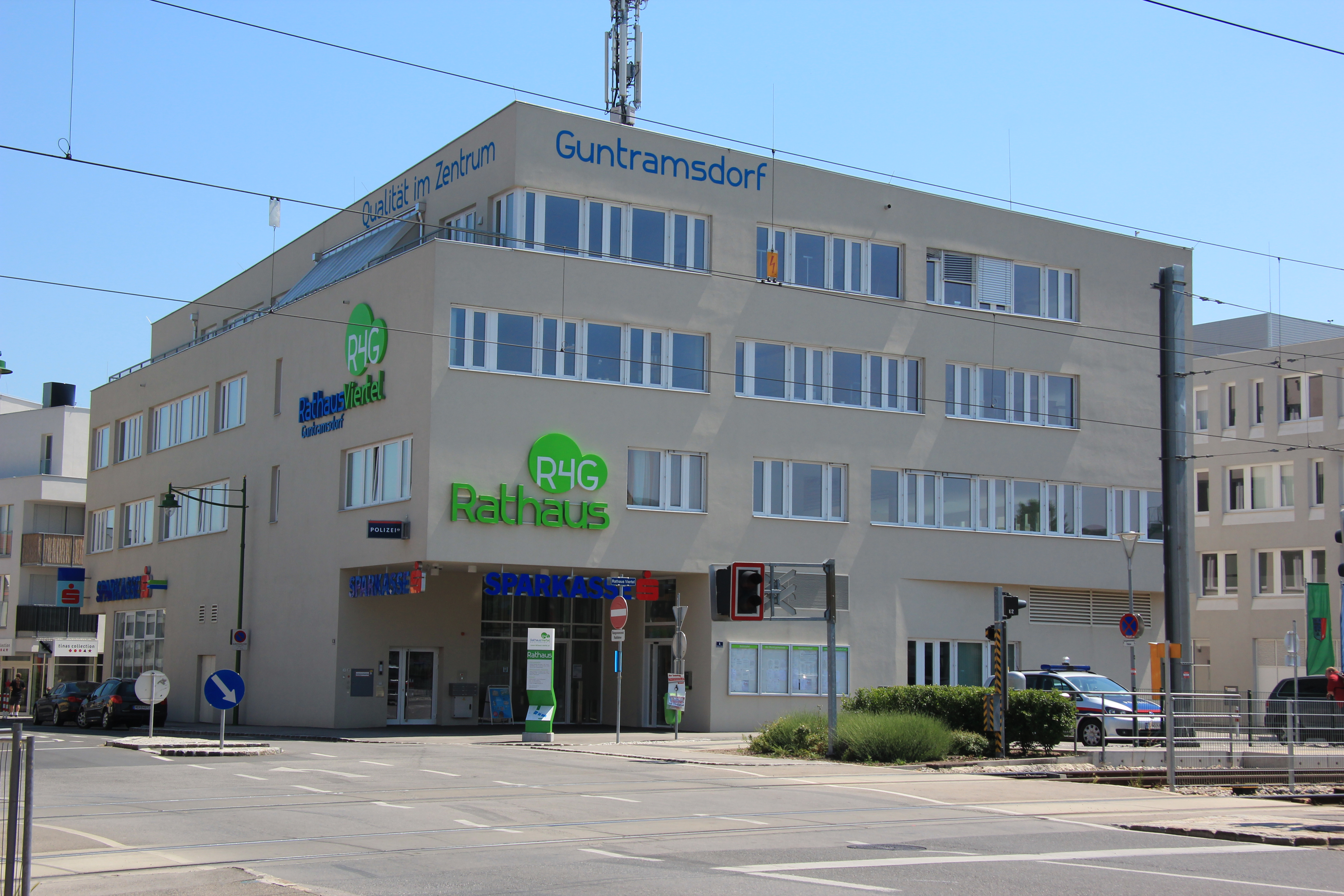 Polizeistation und Erste Bank im Rathausviertel in Guntramsdorf, Niederösterreich